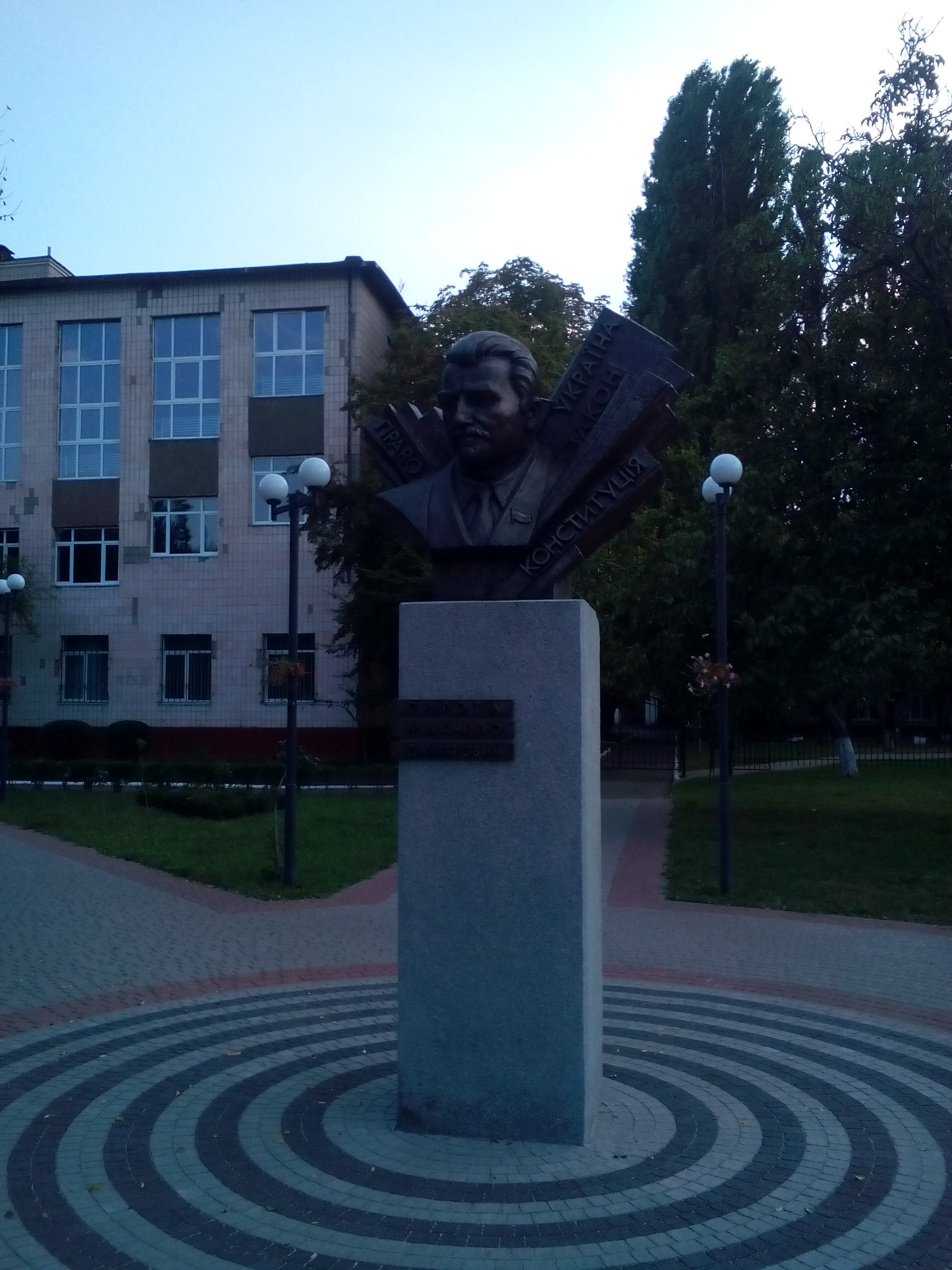 Погруддя Сироти М.Д. перед одним із корпусів Черкаського державного технологічного університету.